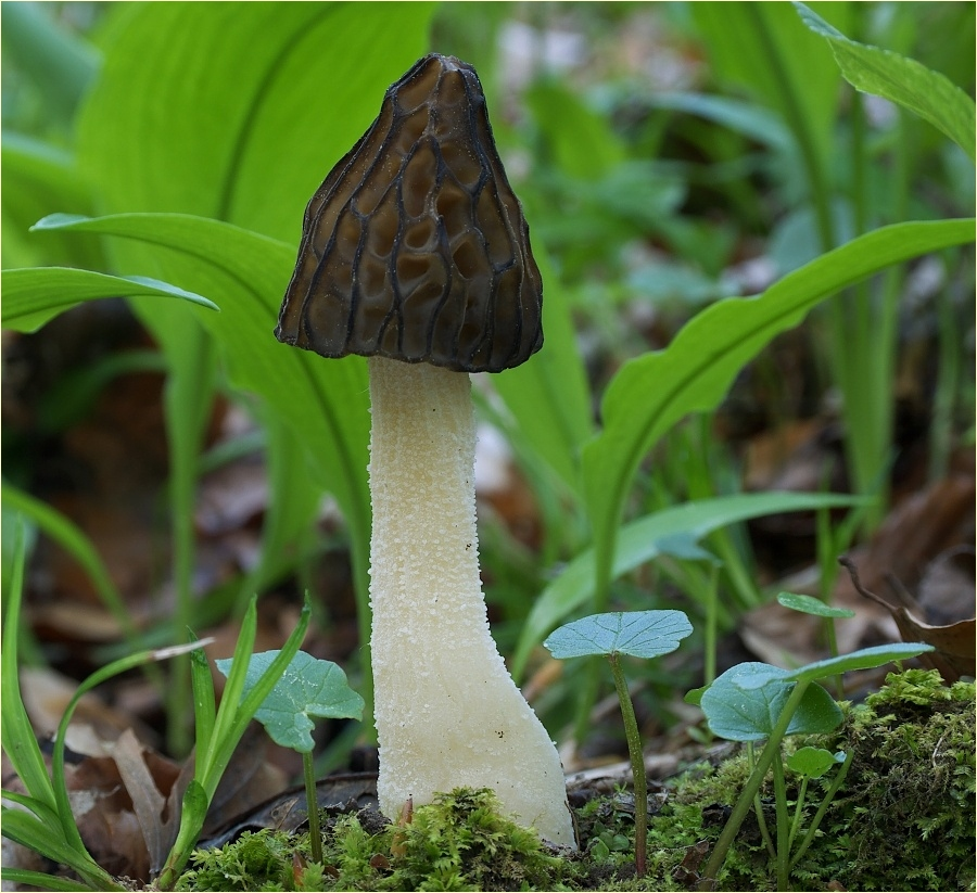 Käppchen-Morchel, Morchella gigas zwischen Bärlauch